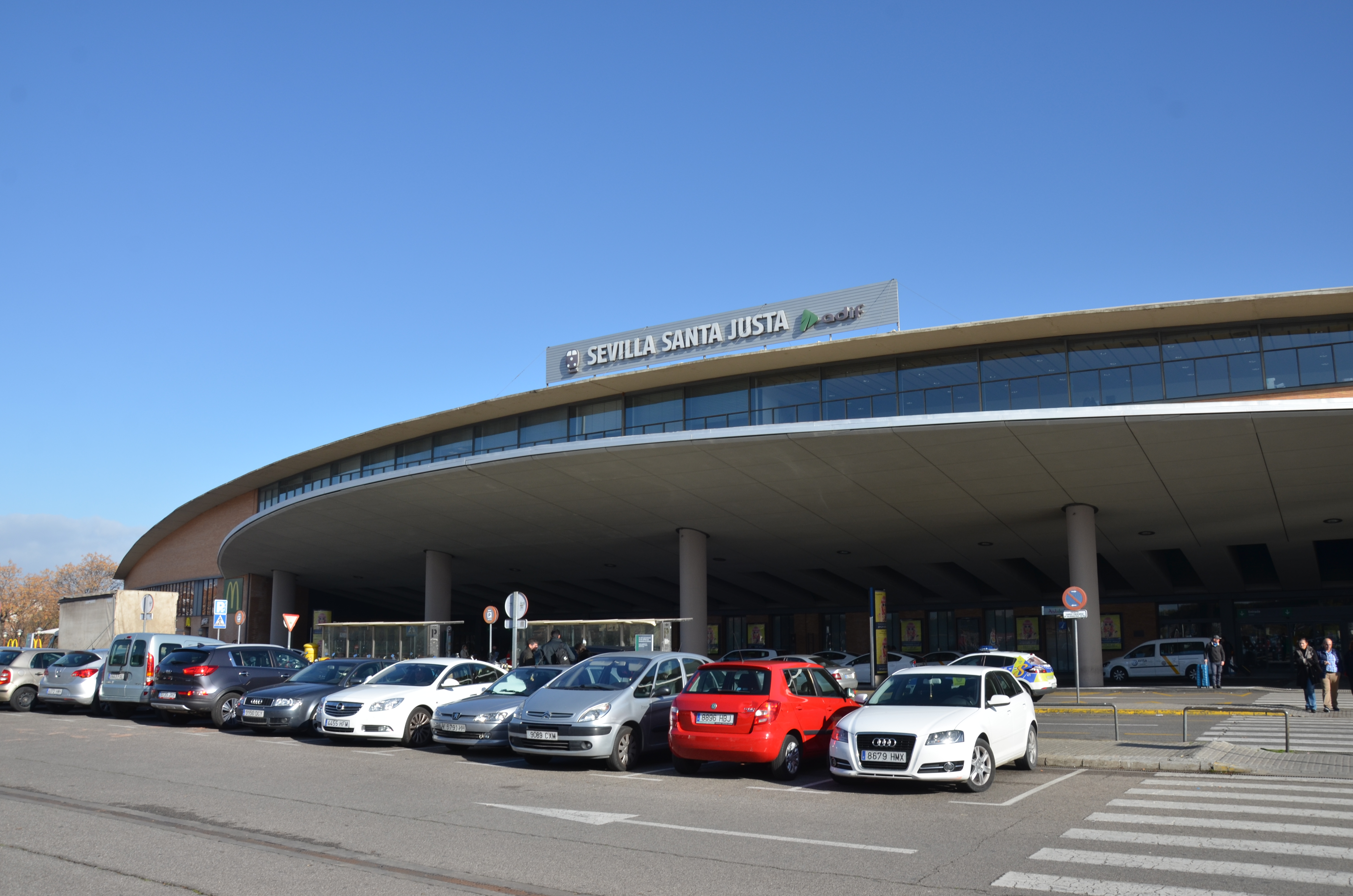 Station Sevilla Santa Justa anno 2018.